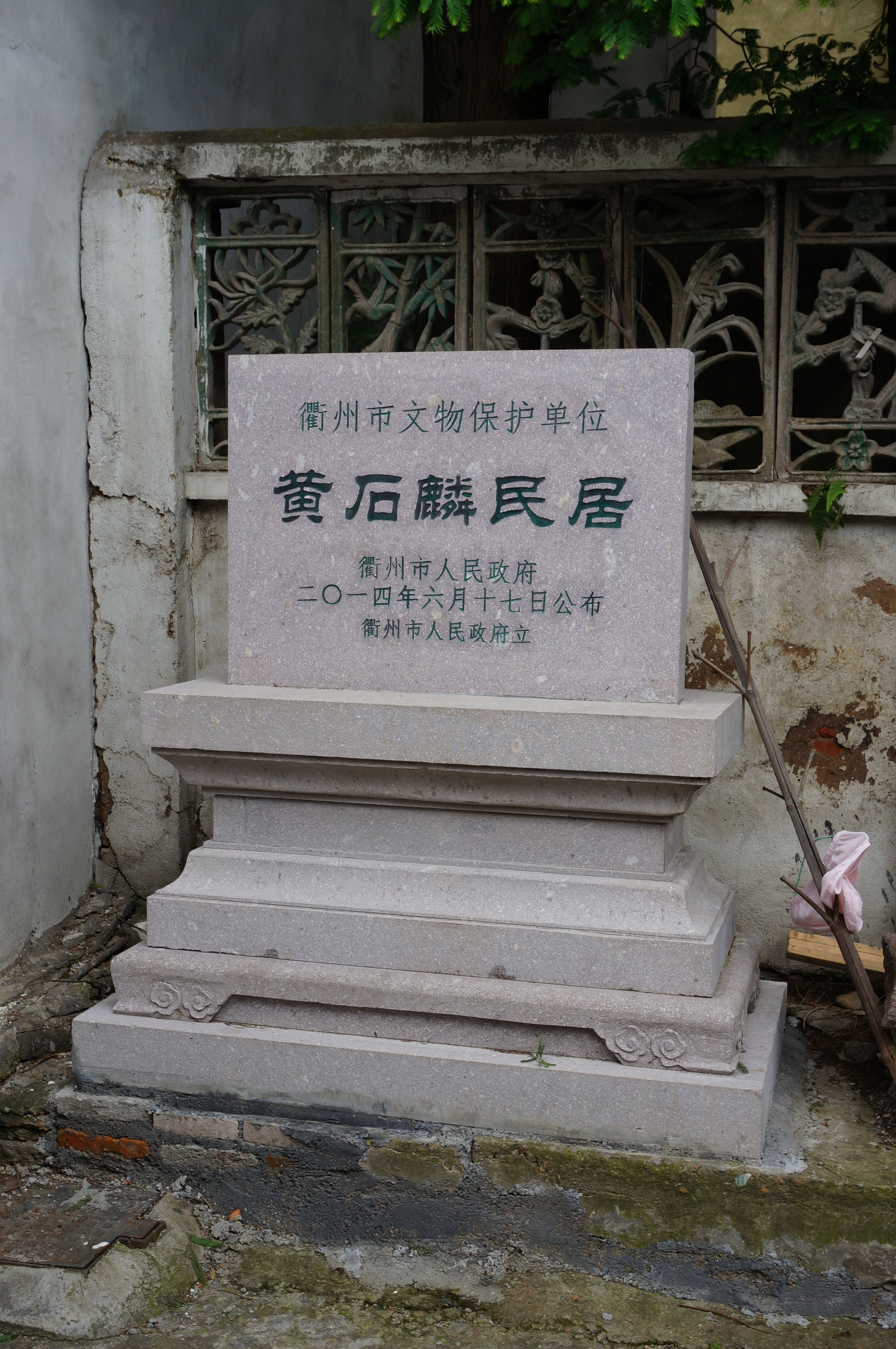 黄石麟民居，文保碑。